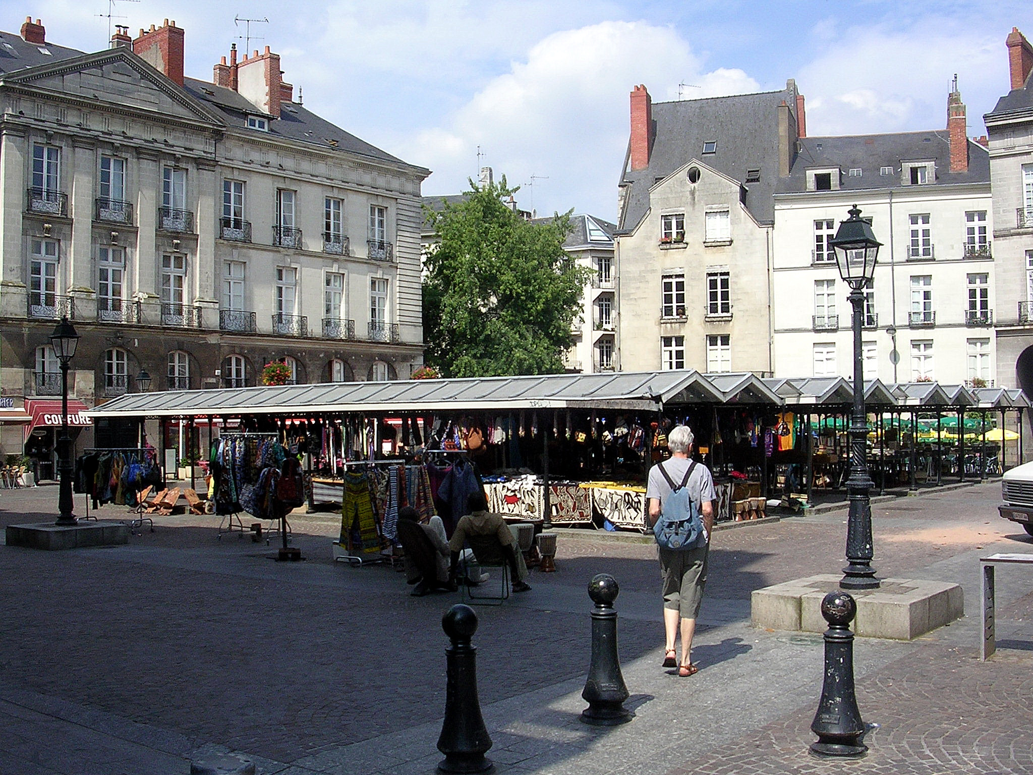 Place du Bouffay, à Nantes (France)